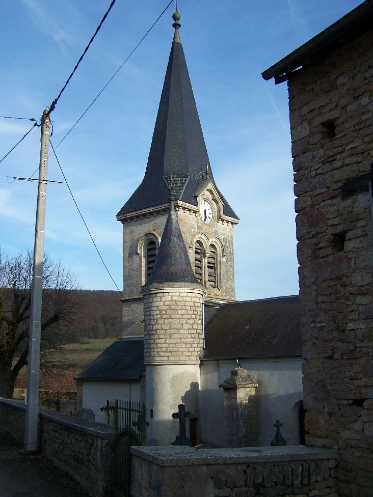 EGLISE DE BARBIREY SUR OUCHE